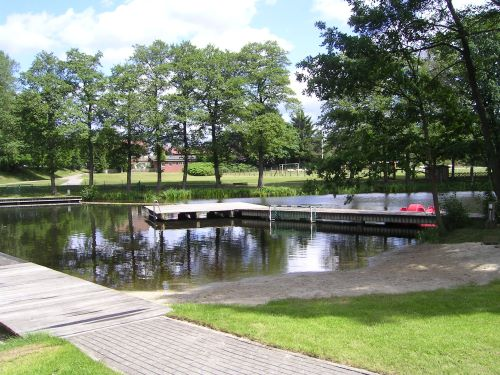 Strandbad Dorfmark. Naturbadesee mit Schwimmaufsicht. Betrieben von Bädergesellschaft Böhmetal GmbH und Förderverein Strandbad Dorfmark e.V.